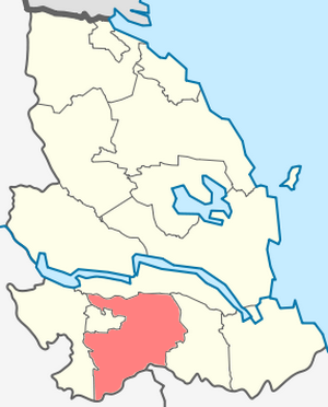 Раздольевское сельское поселение